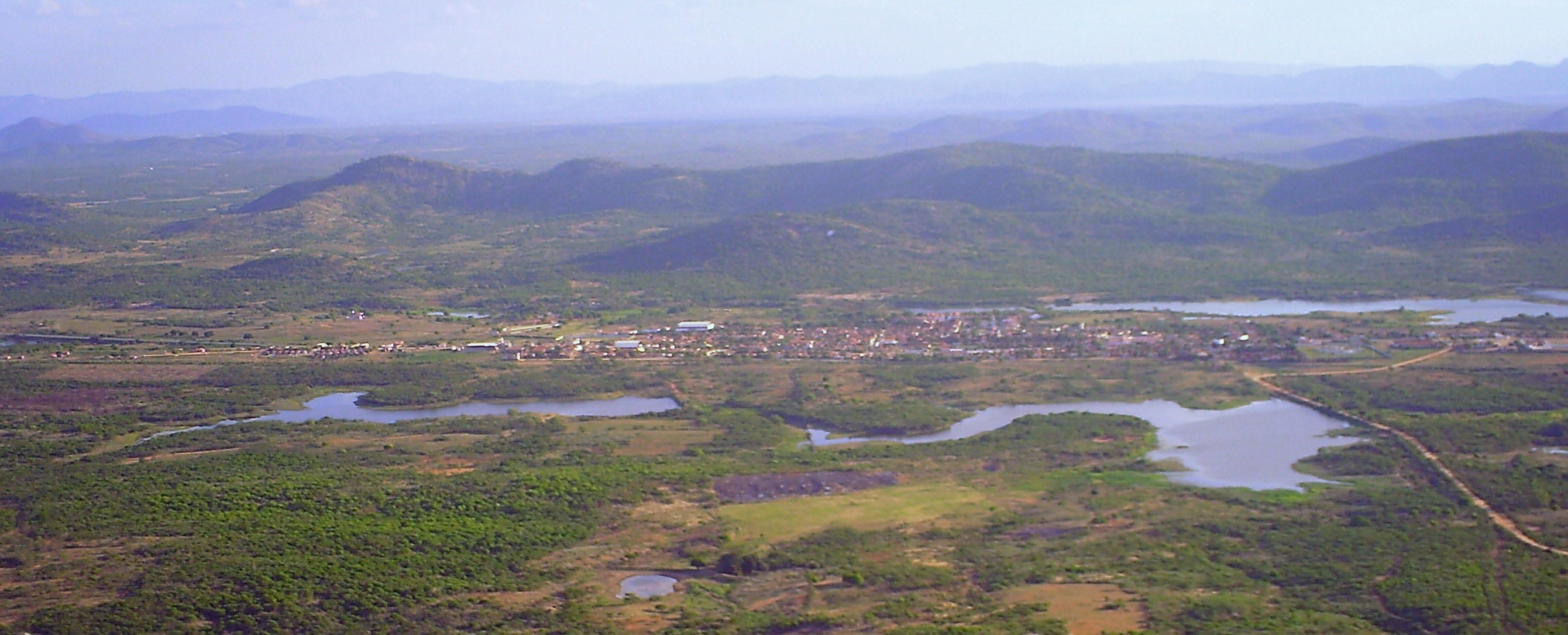 Vista do topo da Serra do Pico de Malta